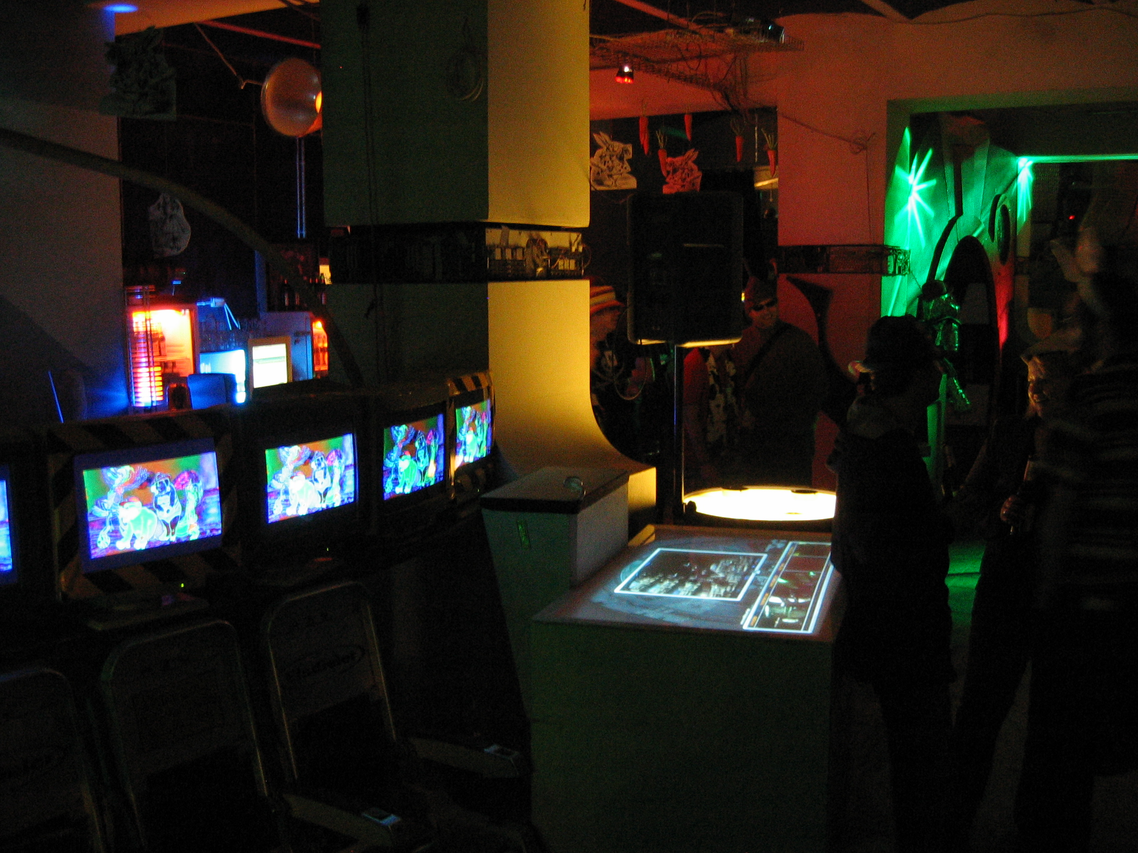 spectáculo en la c-base